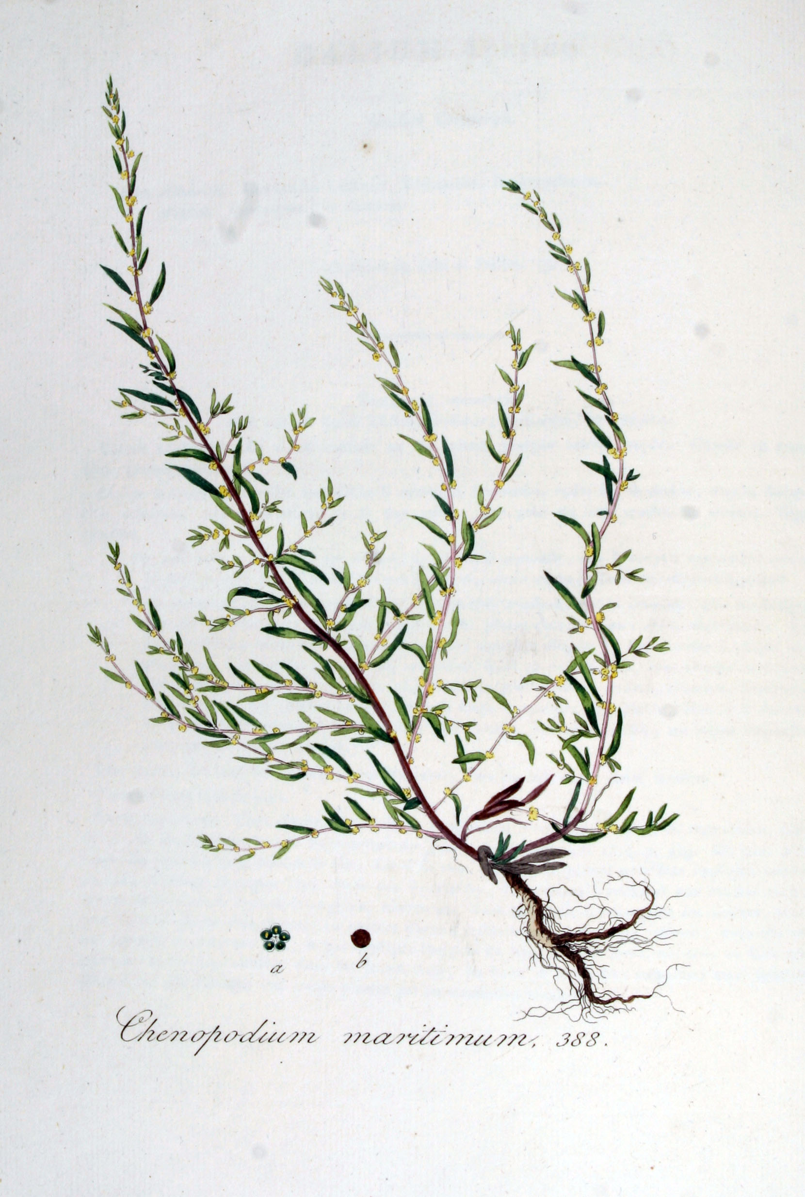 Suaeda maritima (L.) Dum. (Syn. Chenopodium maritimum L.)